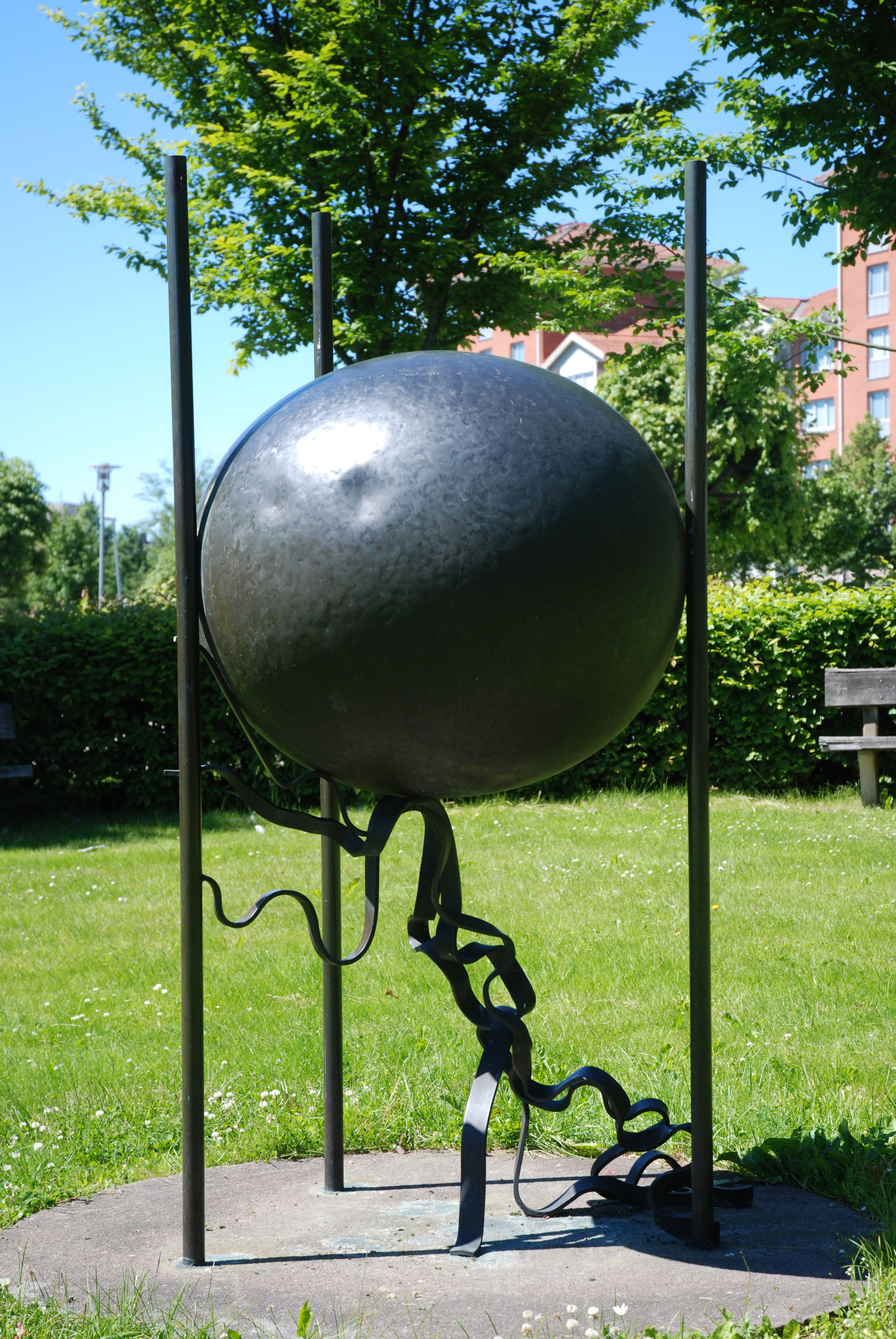 Ingemar Svensson´s sculpture Glob (Globe), Ljungby, Sweden